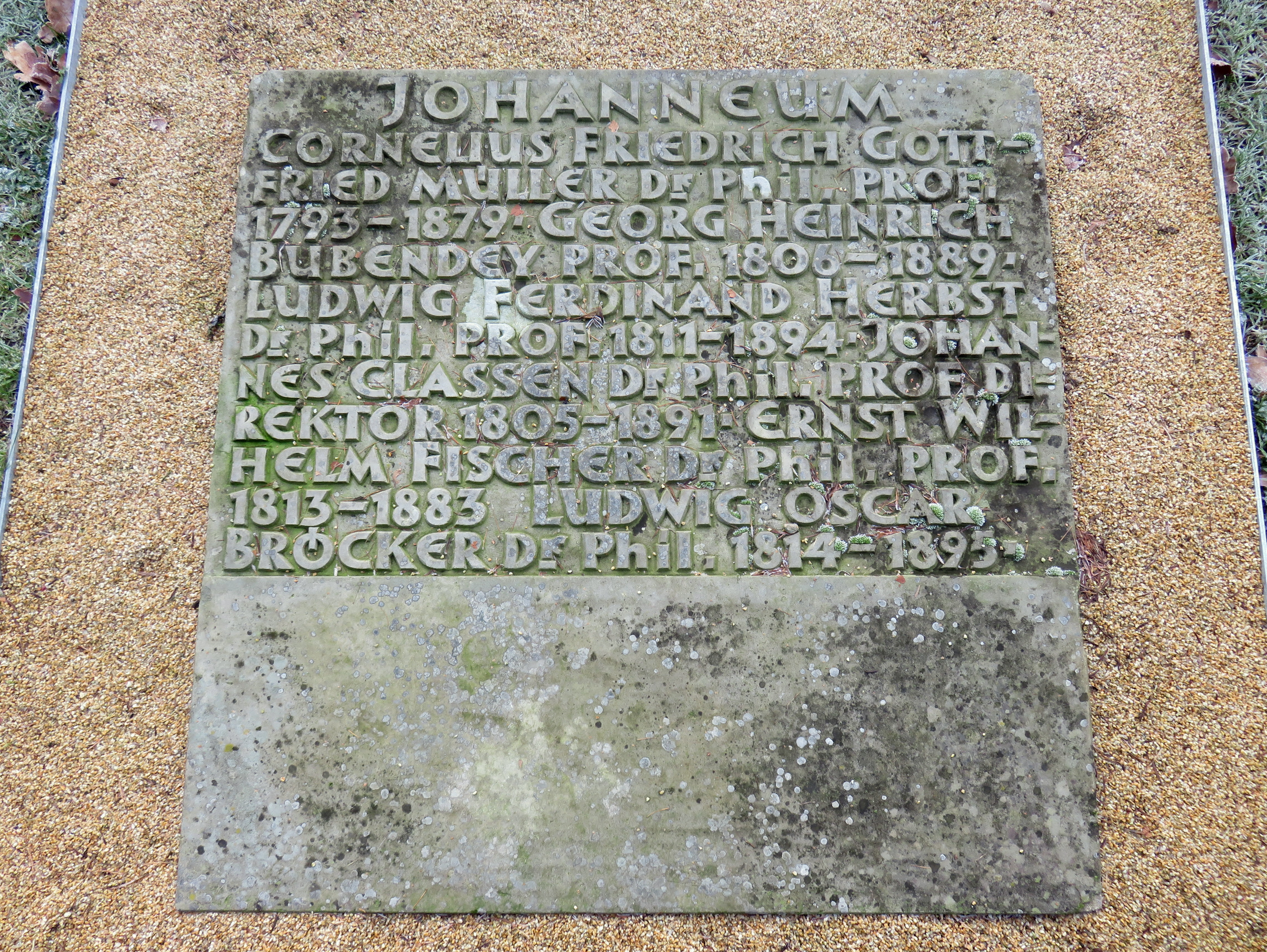 Sammelgrab Johanneum im Bereich des Althamburgischen Gedächtnisfriedhofs auf dem Hamburger Friedhof Ohlsdorf zu Ehren von unter anderem Ludwig Ferdinand Herbst, Johannes Classen.